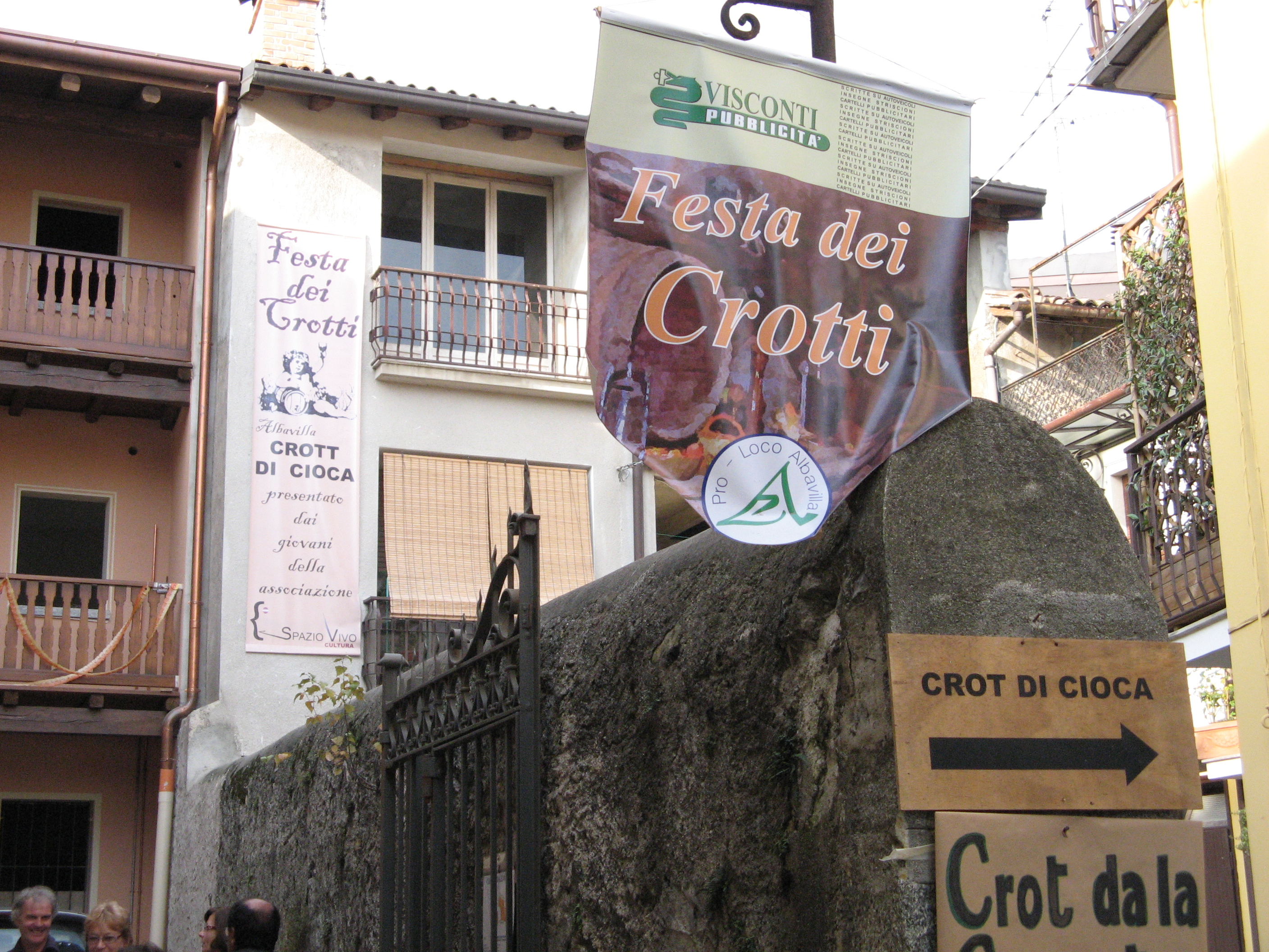 by Mark alba